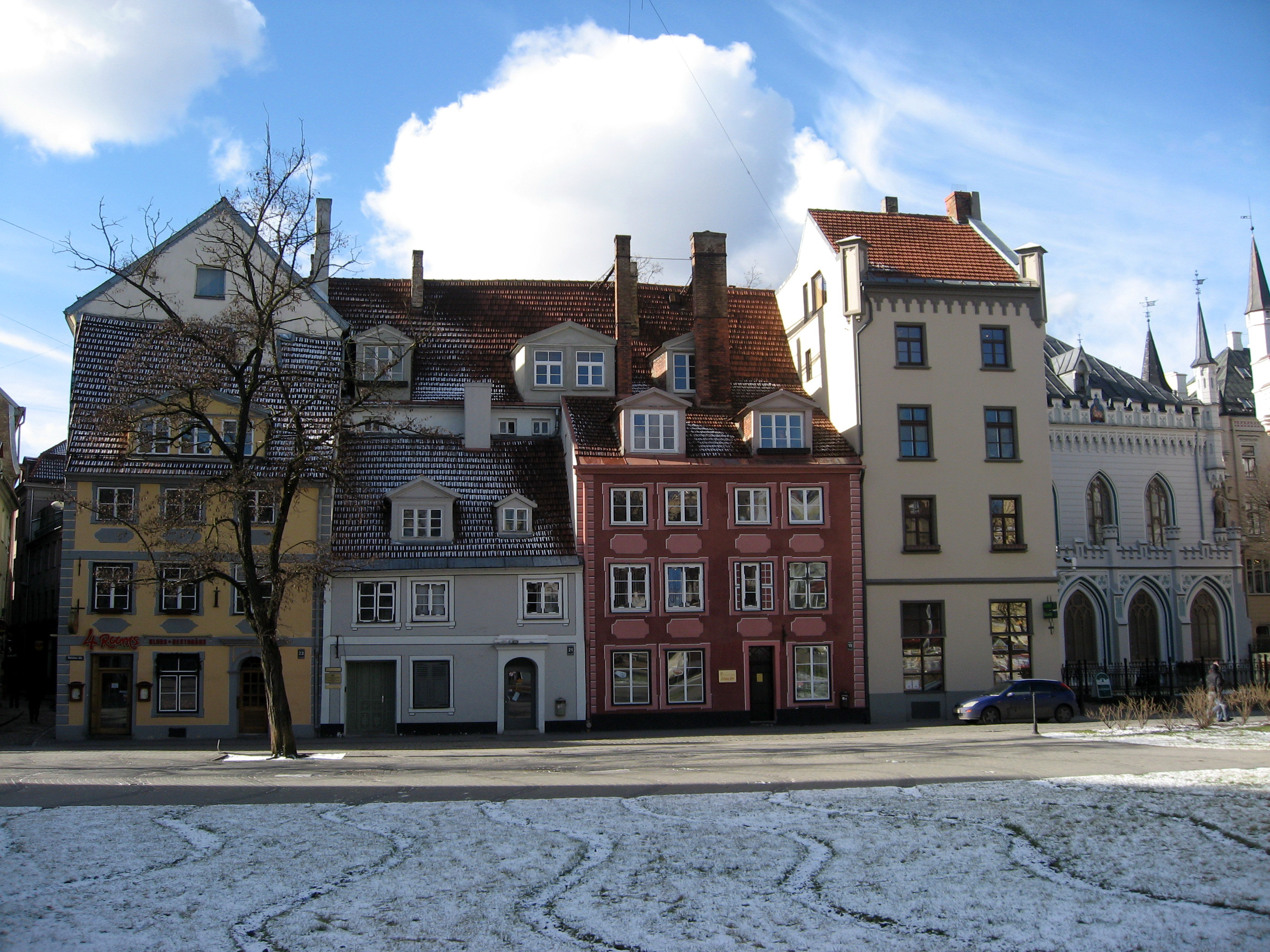 Domy v centru Rigy